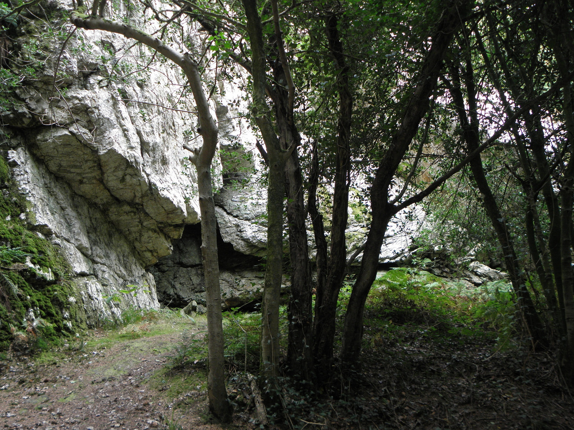 Grotte et rocher de Roc'h-Toul en Guiclan (29). .